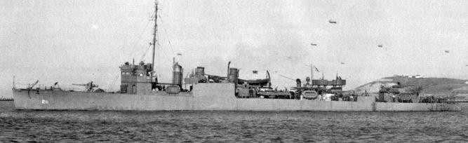 USS Alden (DD-211) in November 1942.